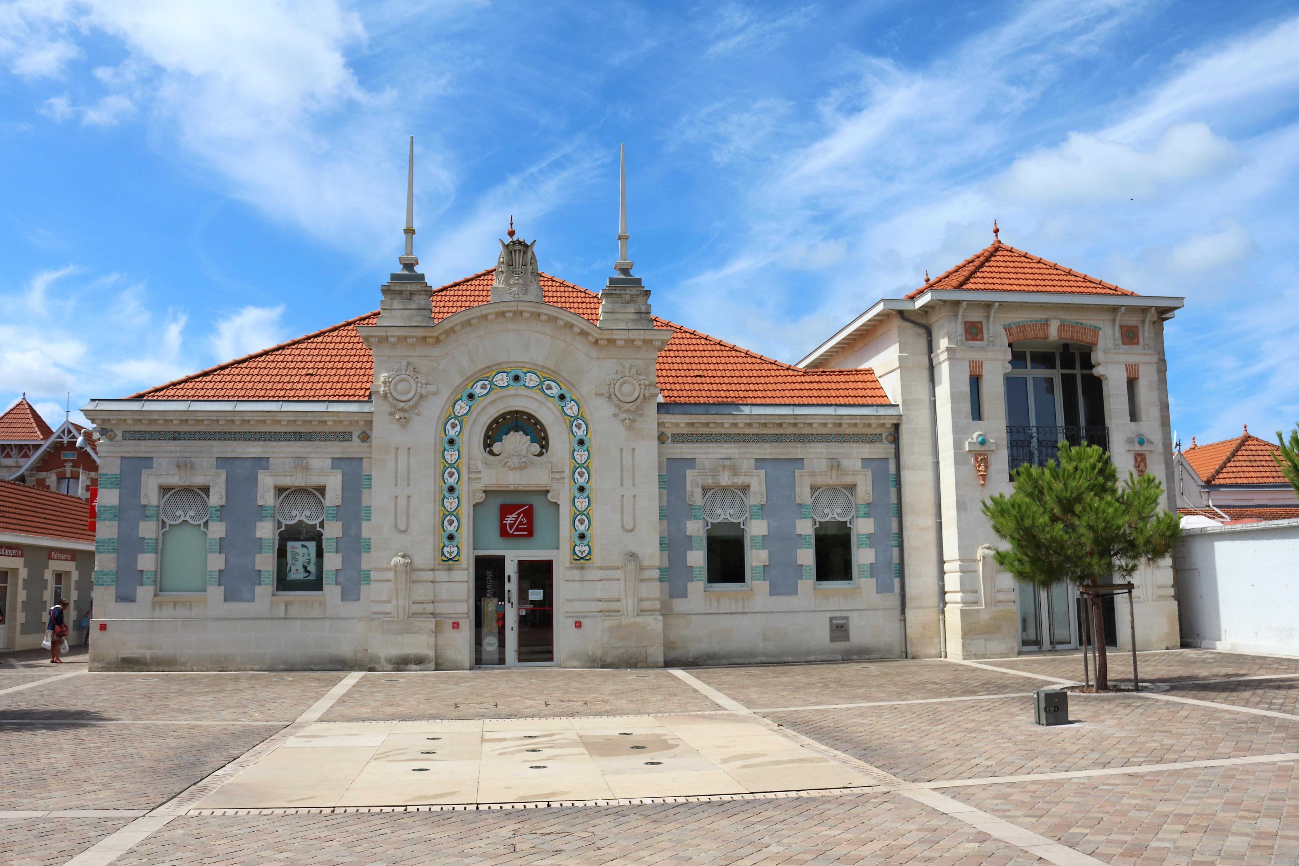 Caisse d'épargne de Soulac-sur-Mer, Gironde, Aquitaine, France.